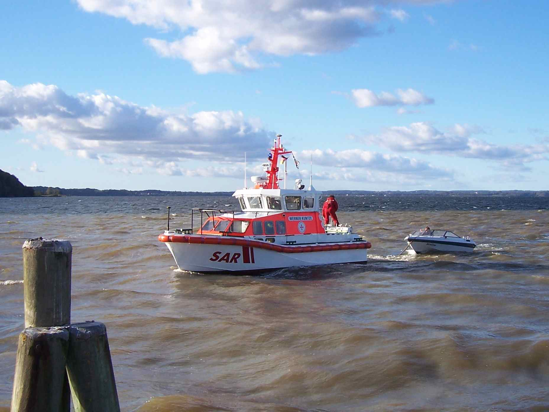 SAR Werner Kuntze in Langballigau